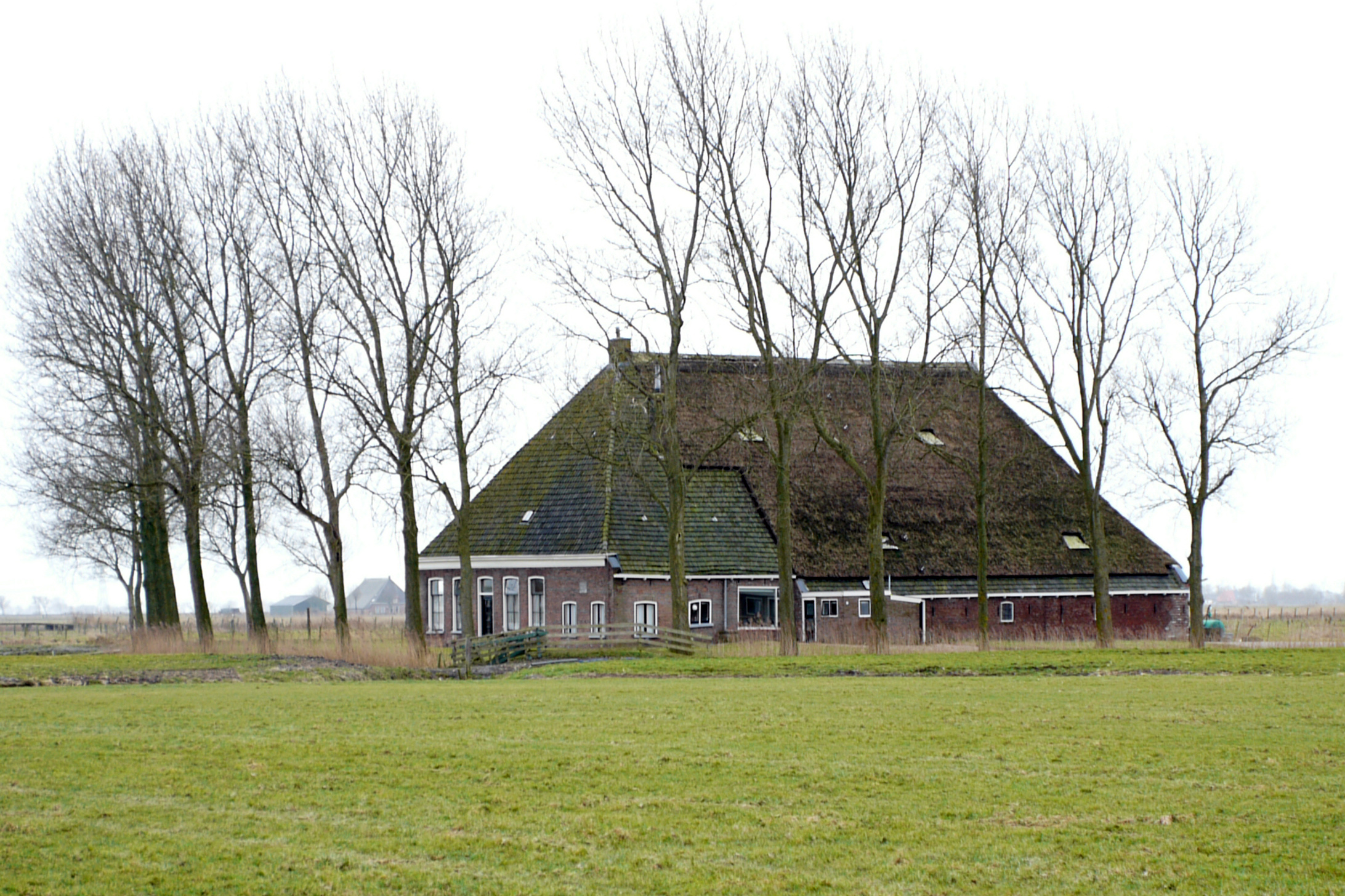 Een Stjelp boerderij